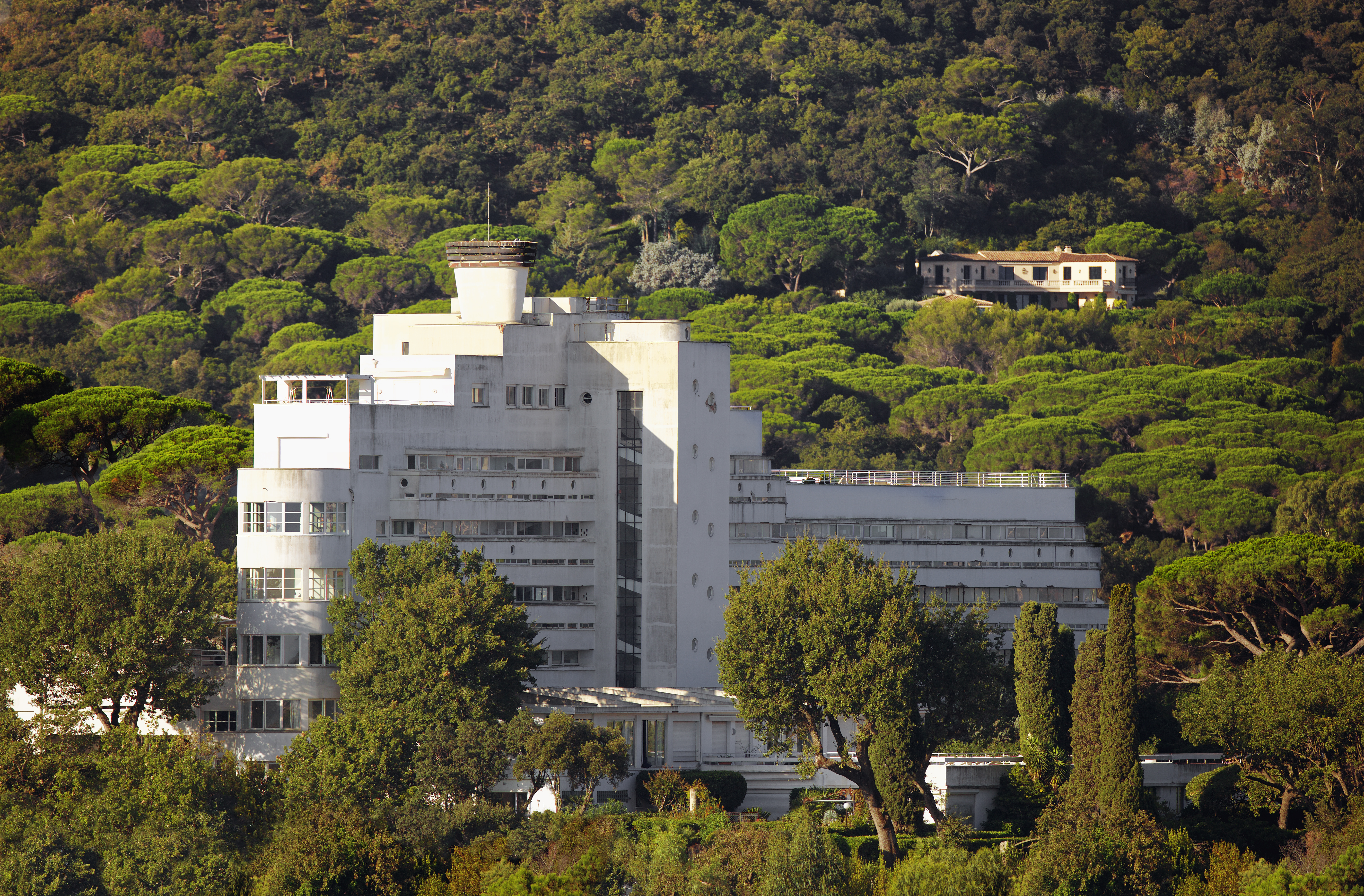 Ostanblick des Latitude 43